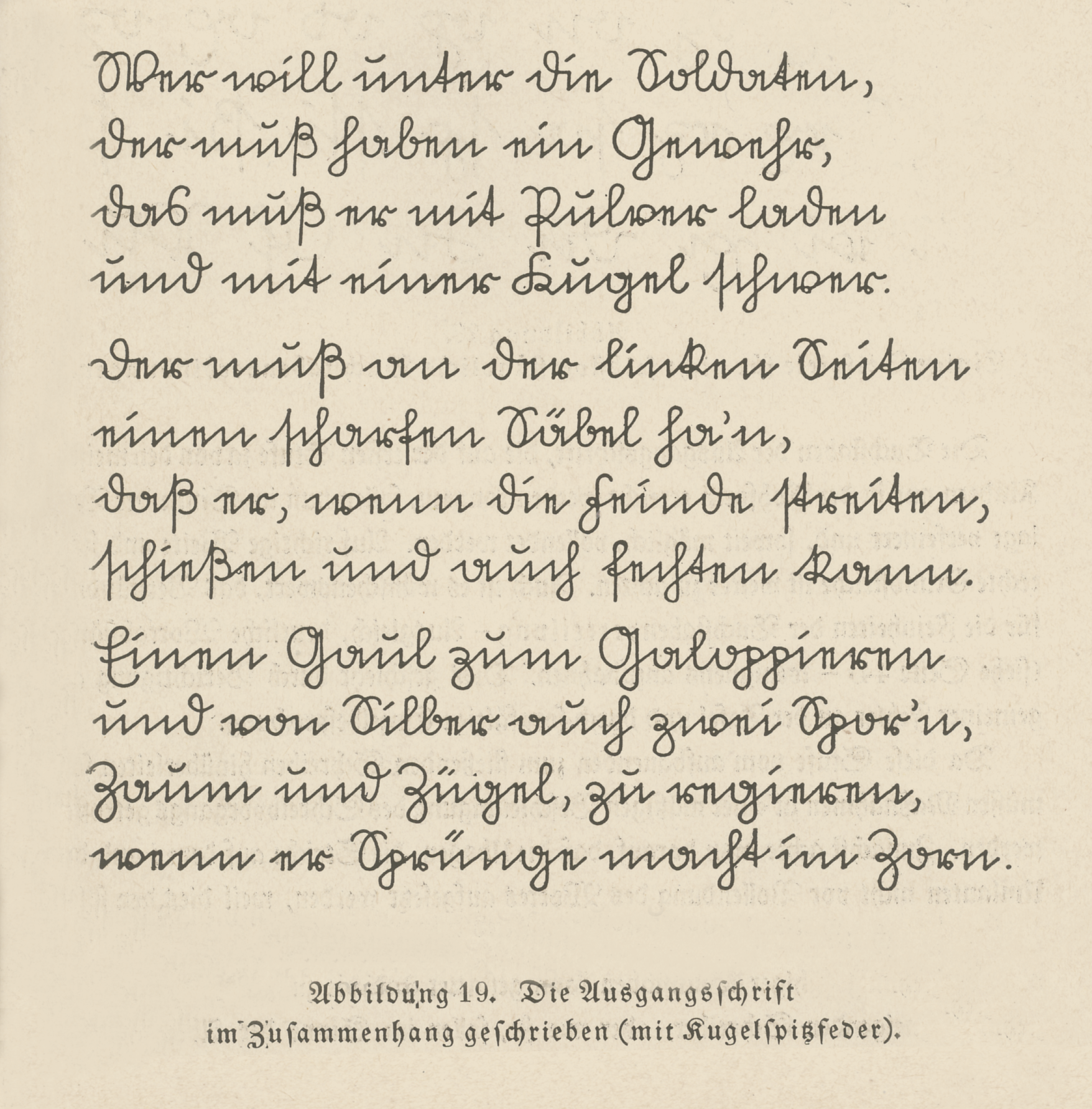 Schriftprobe mit Kugelspitzfeder in deutscher Kurrent